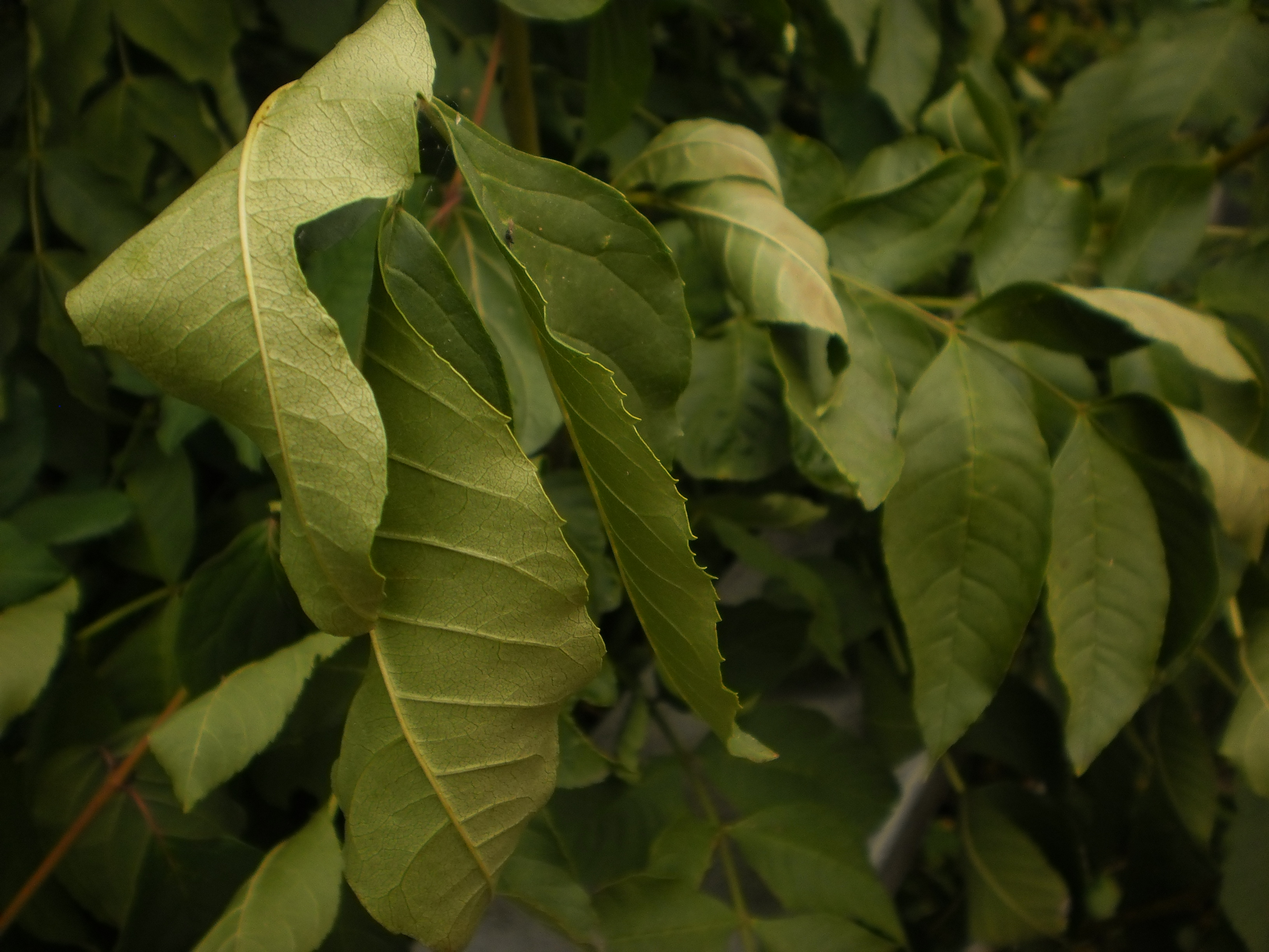 Eingerollte grüne Blätter der Esche (Eberesche?) nach Tagen andauernder Trockenheit und Sommerhitze mit Anzeichen von Trockenstress des jungen Triebs an einer Straßenböschung in Marburg, der leichte Regen an diesem Tag hat die Wurzeln wohl noch nicht erreicht oder war nicht ausreichend. 25. Juli 2018.